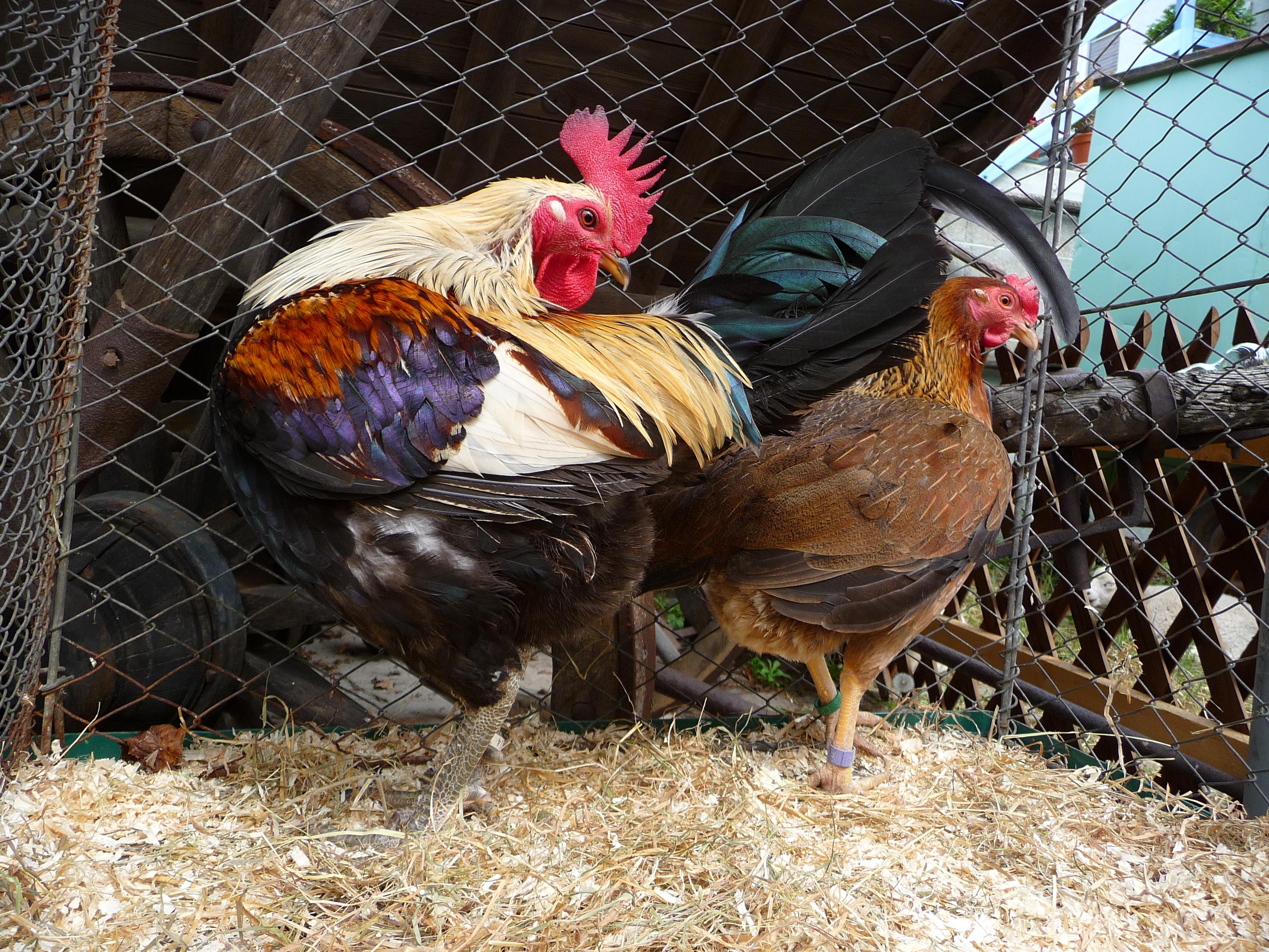 Altenglischer Zwerg-Kämpfer (Old English Game Bantam), Hahn und Henne, fotografiert in Baden-Württemberg (Deutschland)